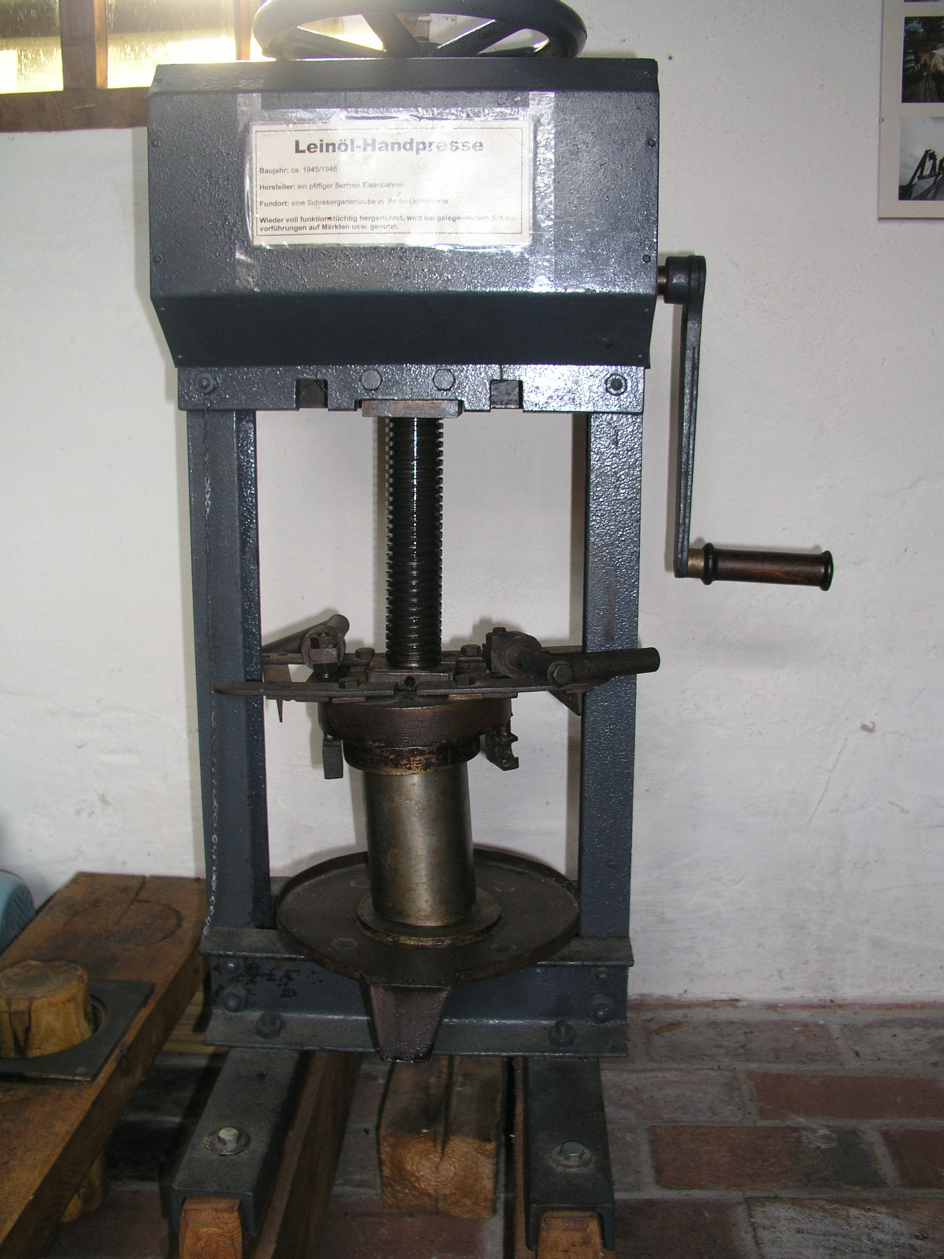 historische Leinöl-Handpresse in der Straupitzer Mühle